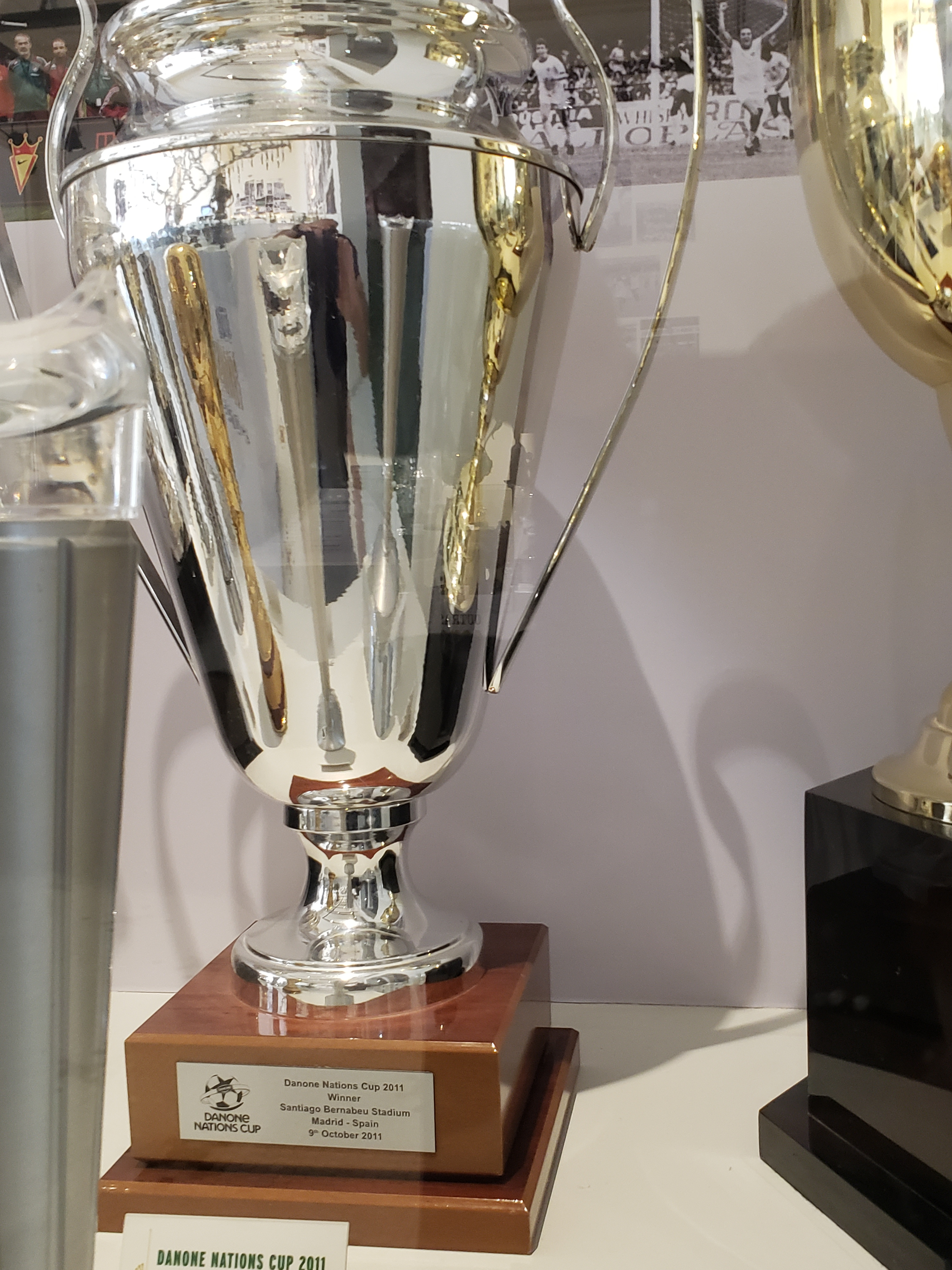 Danone Nations Cup 2011 Sub 13 conquistada pelo Fluminense Football Club.